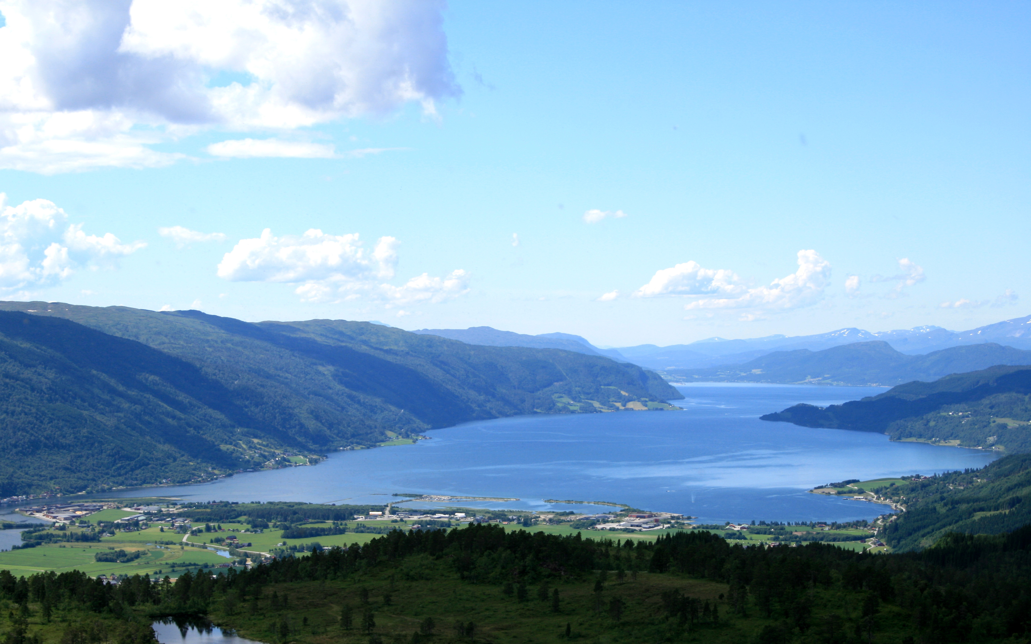 Norsk (bokmål):Surnadalsfjorden